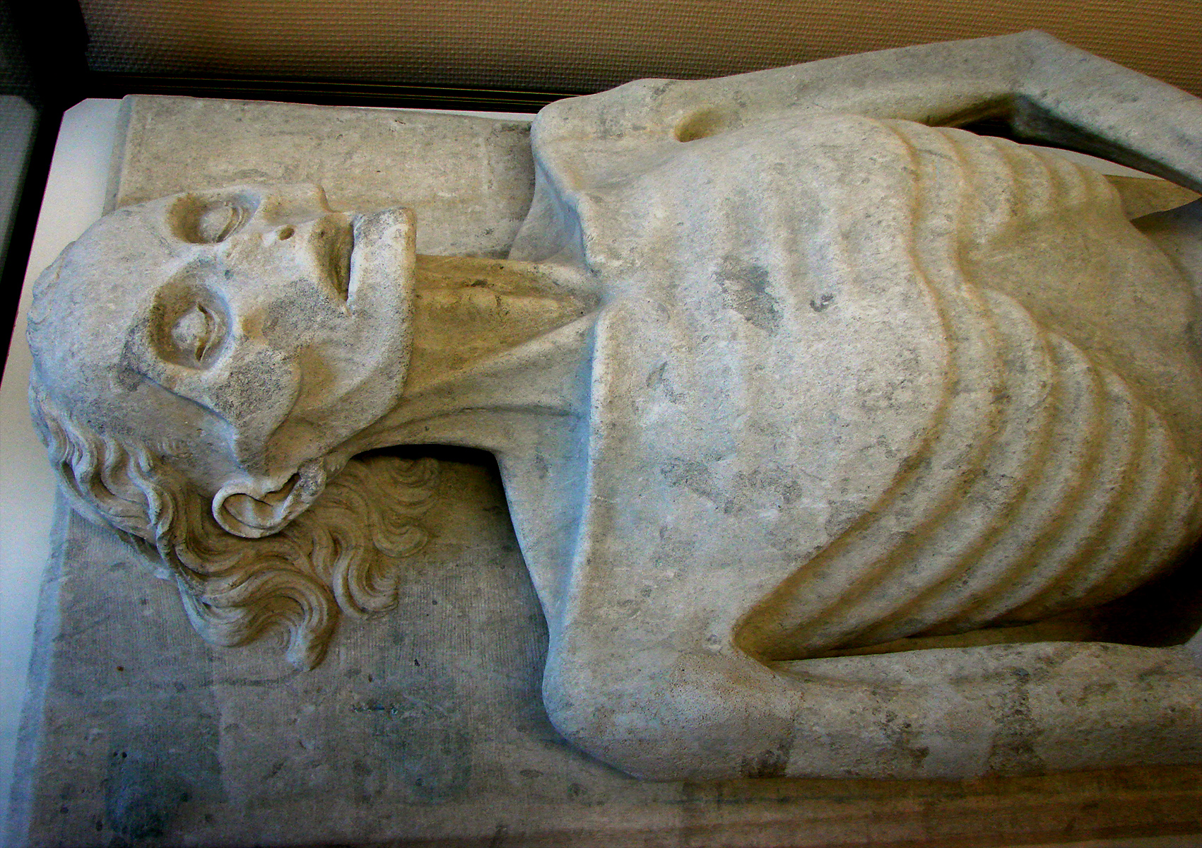 Pierre funéraire de Guillaume de Harcigny, 1394. C'est le plus ancien gisant-transi conservé en France. Guillaume de Harcigny était un célèbre médecin (Laon, vers 1300 - Laon, 1394) qui a soigné le roi Charles VI. Musée de Laon.